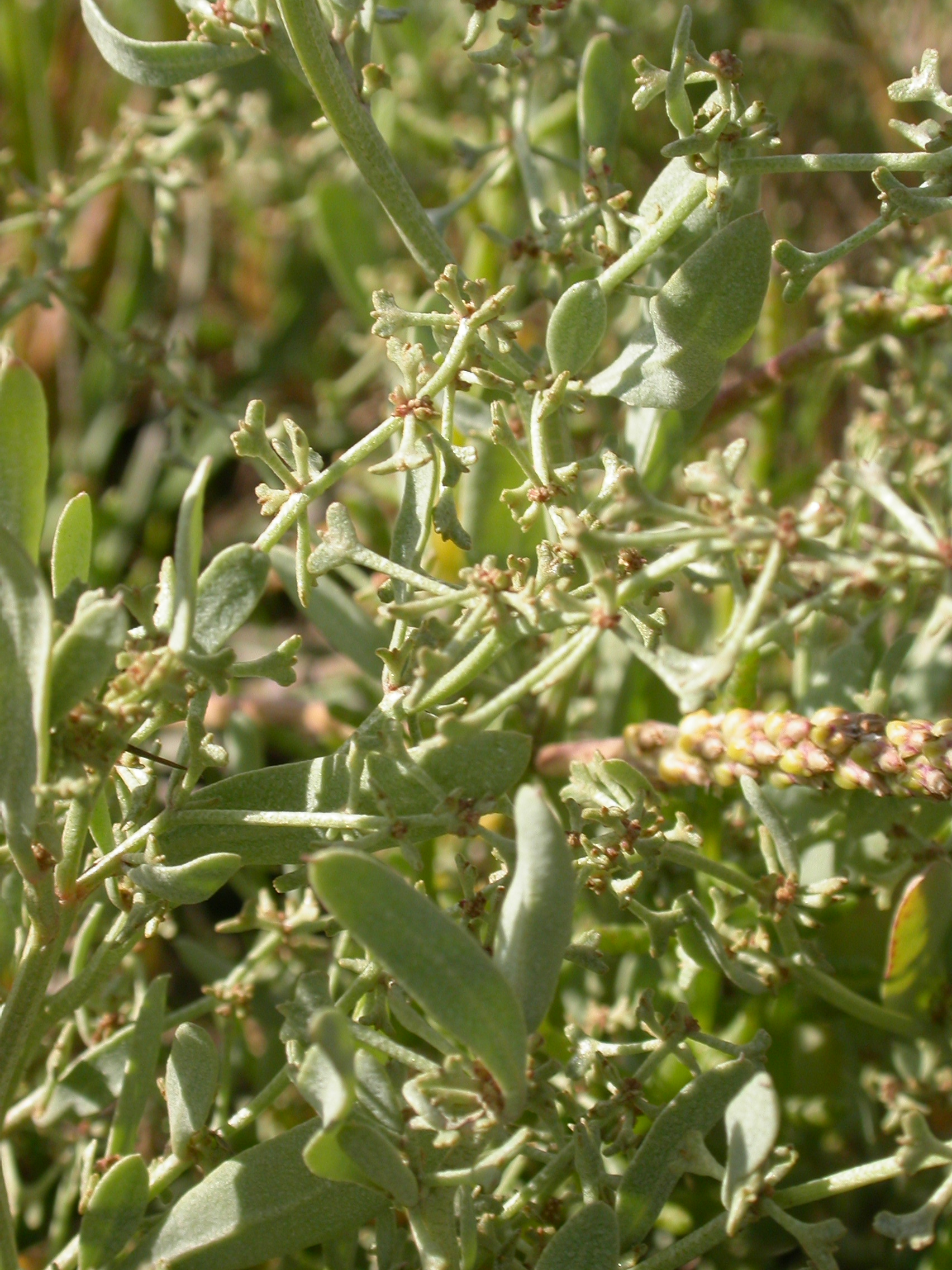 Halimione pedunculata Baie-d'Authie (Somme), France